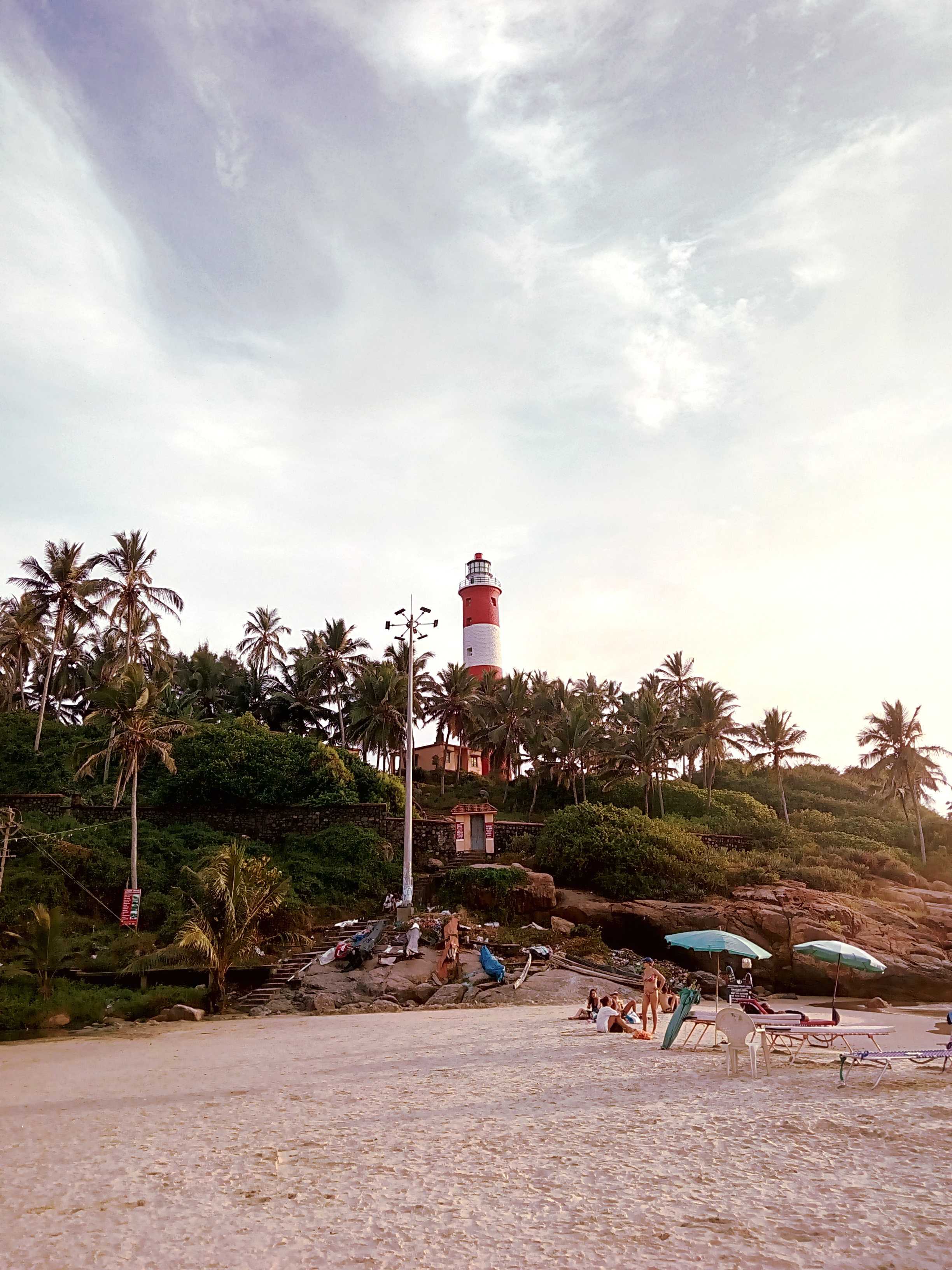 വിഴിഞ്ഞം വിളക്കുമാടം